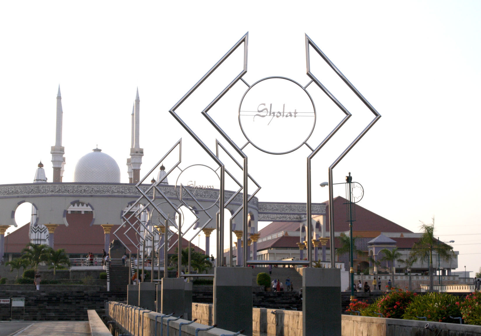 Masjid Agung Semarang,Jawa Tengah,Indonesia